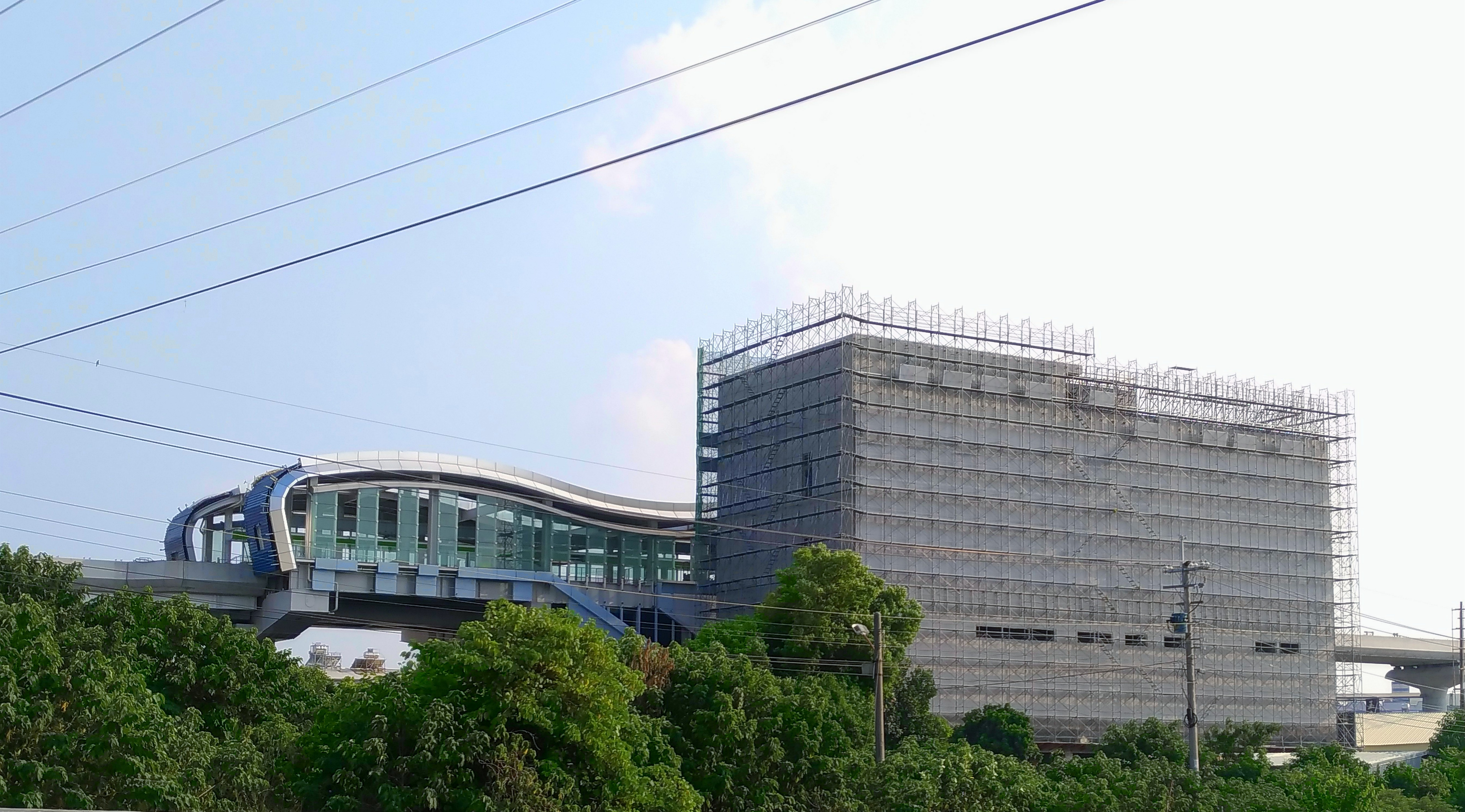 臺中捷運G15站2017年10月工程